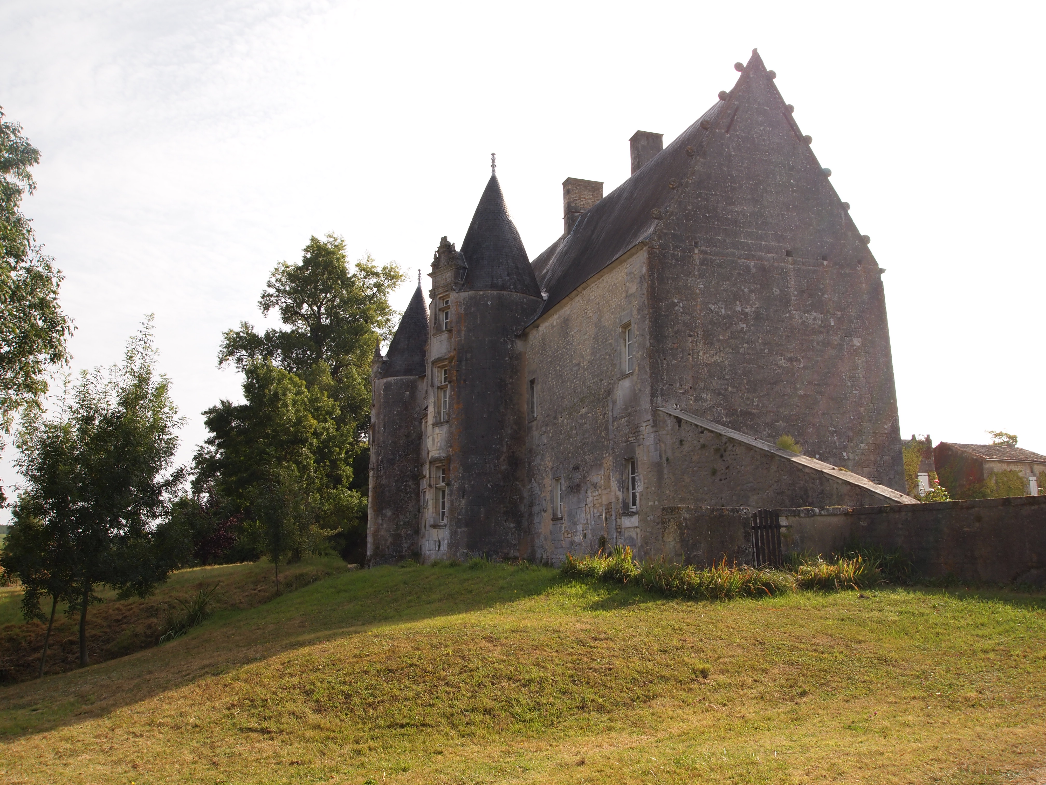 Château du Breuil, à Bonneuil en Charente (inscrit, 1952)